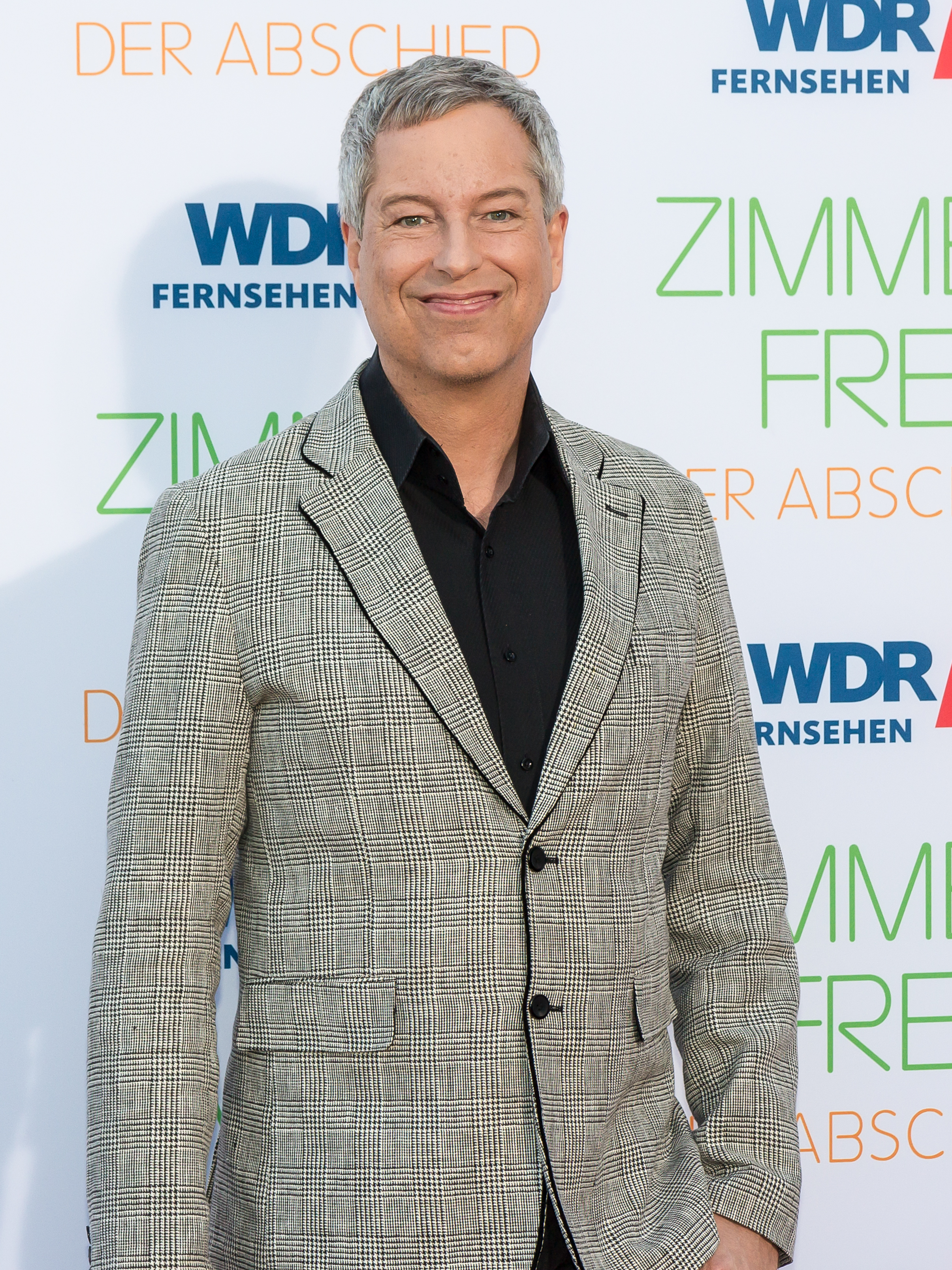 Zimmer frei - der Abschied Foto: Thomas Hermanns